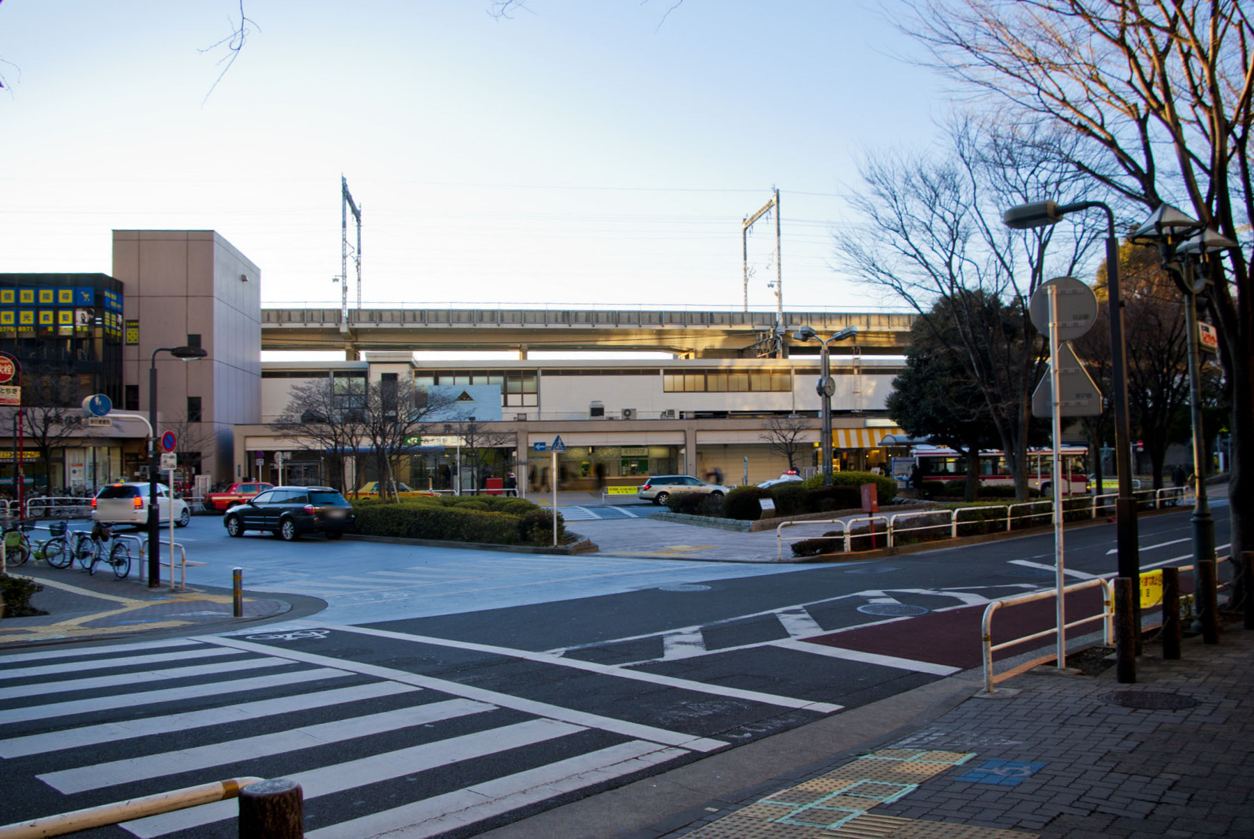 東日本旅客鉄道横須賀線西大井駅